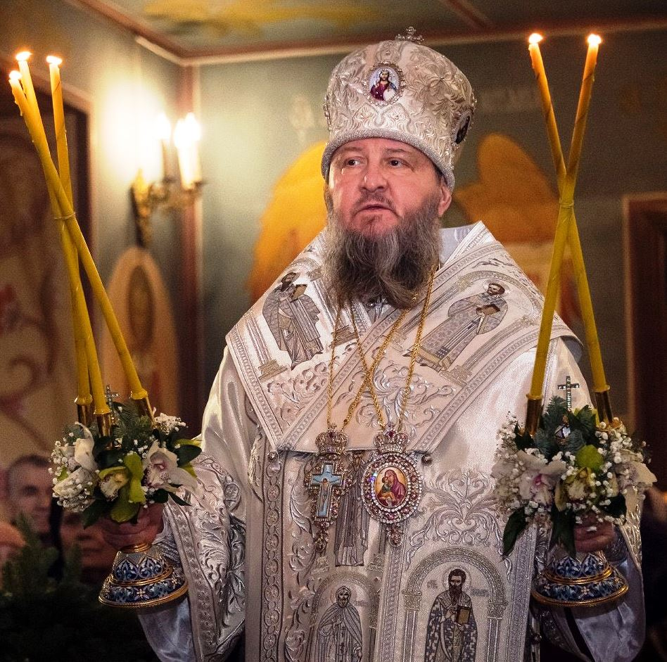 Архиепископ Тираспольский и Дубоссарский Савва. Рождественское богослужение в Кафедральном соборе (Тирасполь).